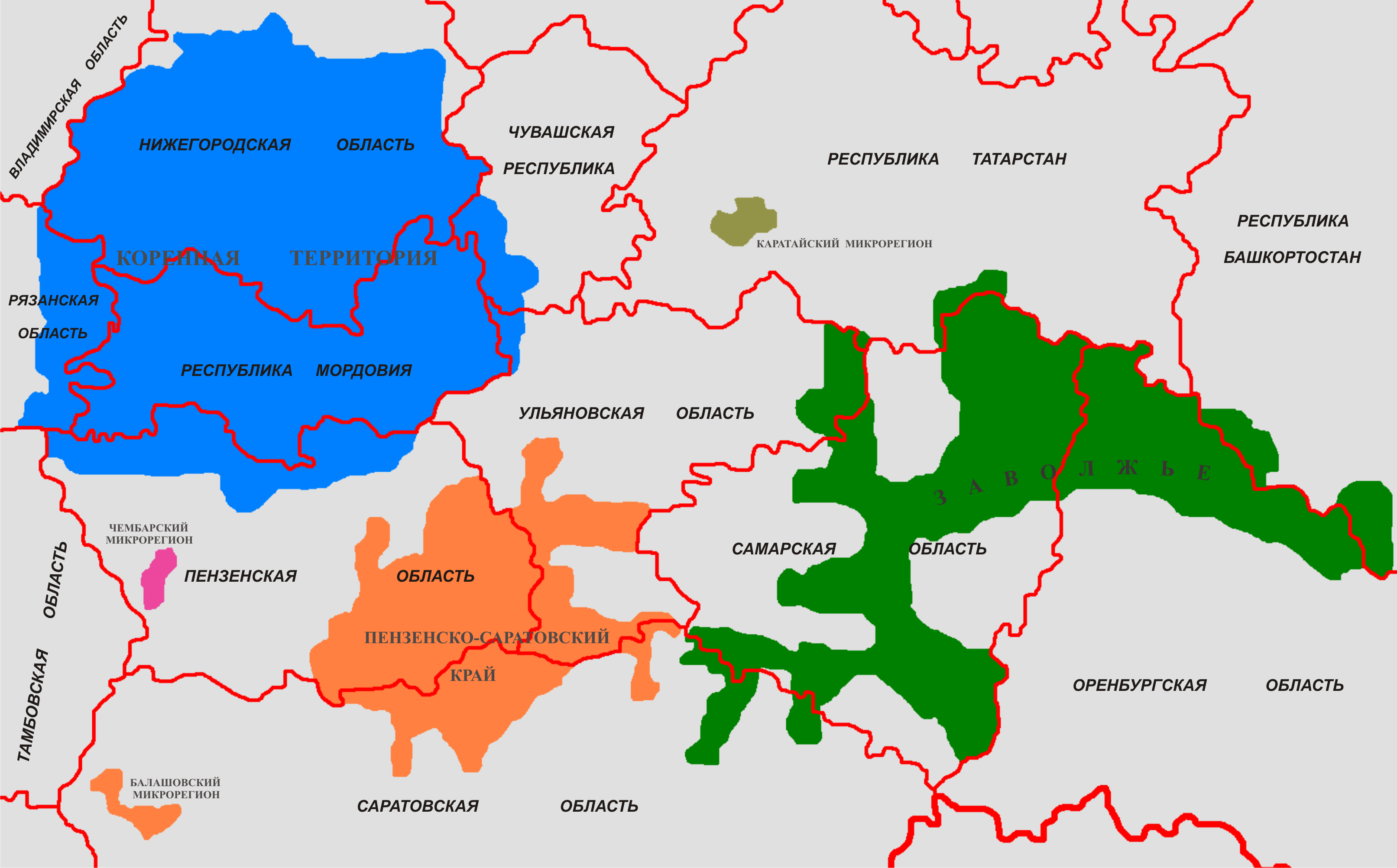 Основные ареалы расселения мордвы в Европейской России